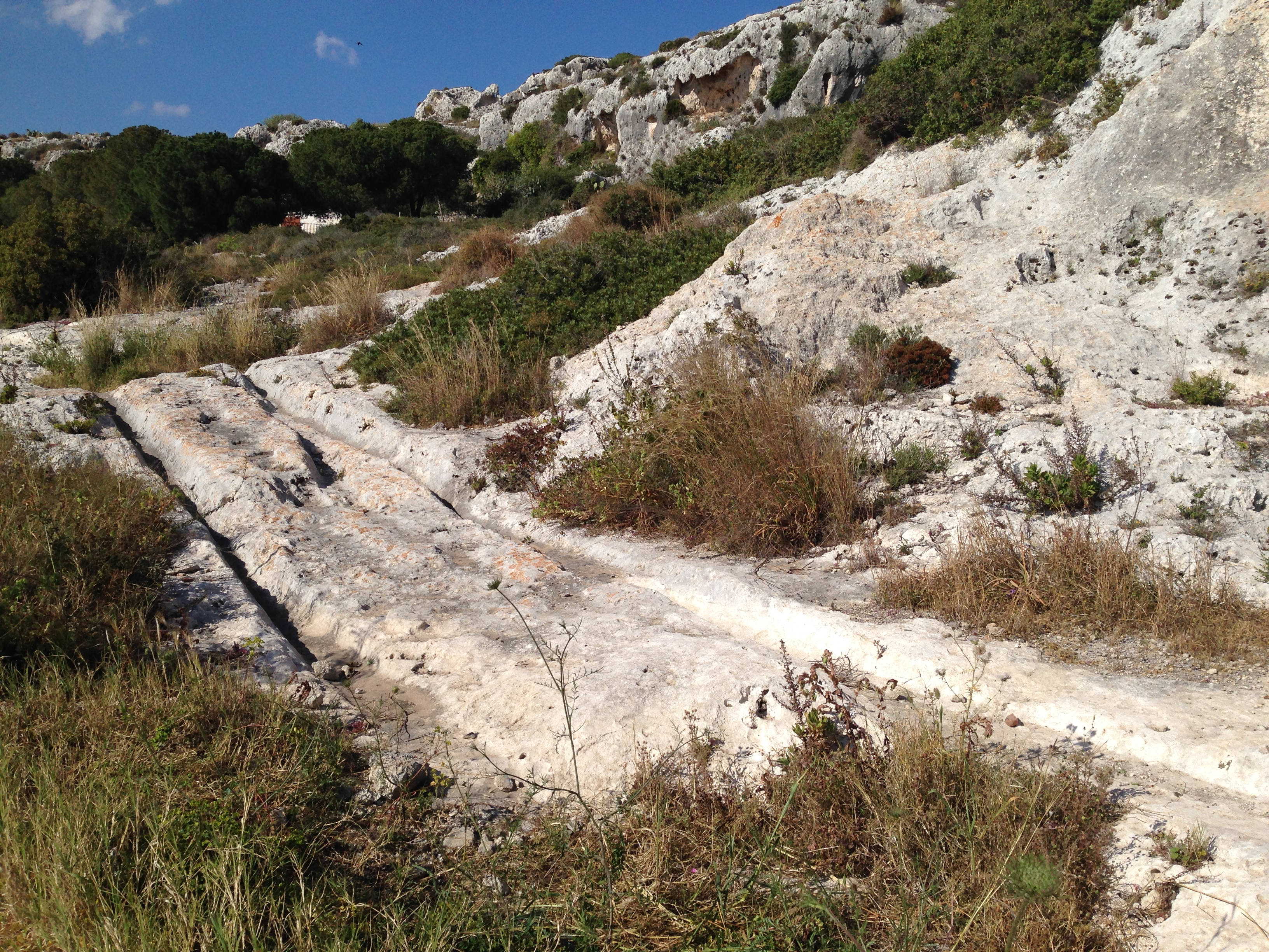 Strada carraia della Penisola Maddalena. sono ben visibili le tracce dei carri.